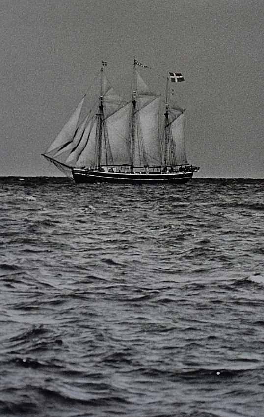 Projet Fulton, DanemarkDansk: Skonnerten Fulton af Marstal 1980